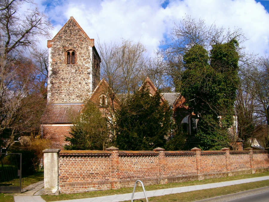 Dorfkirche Neuenhagen